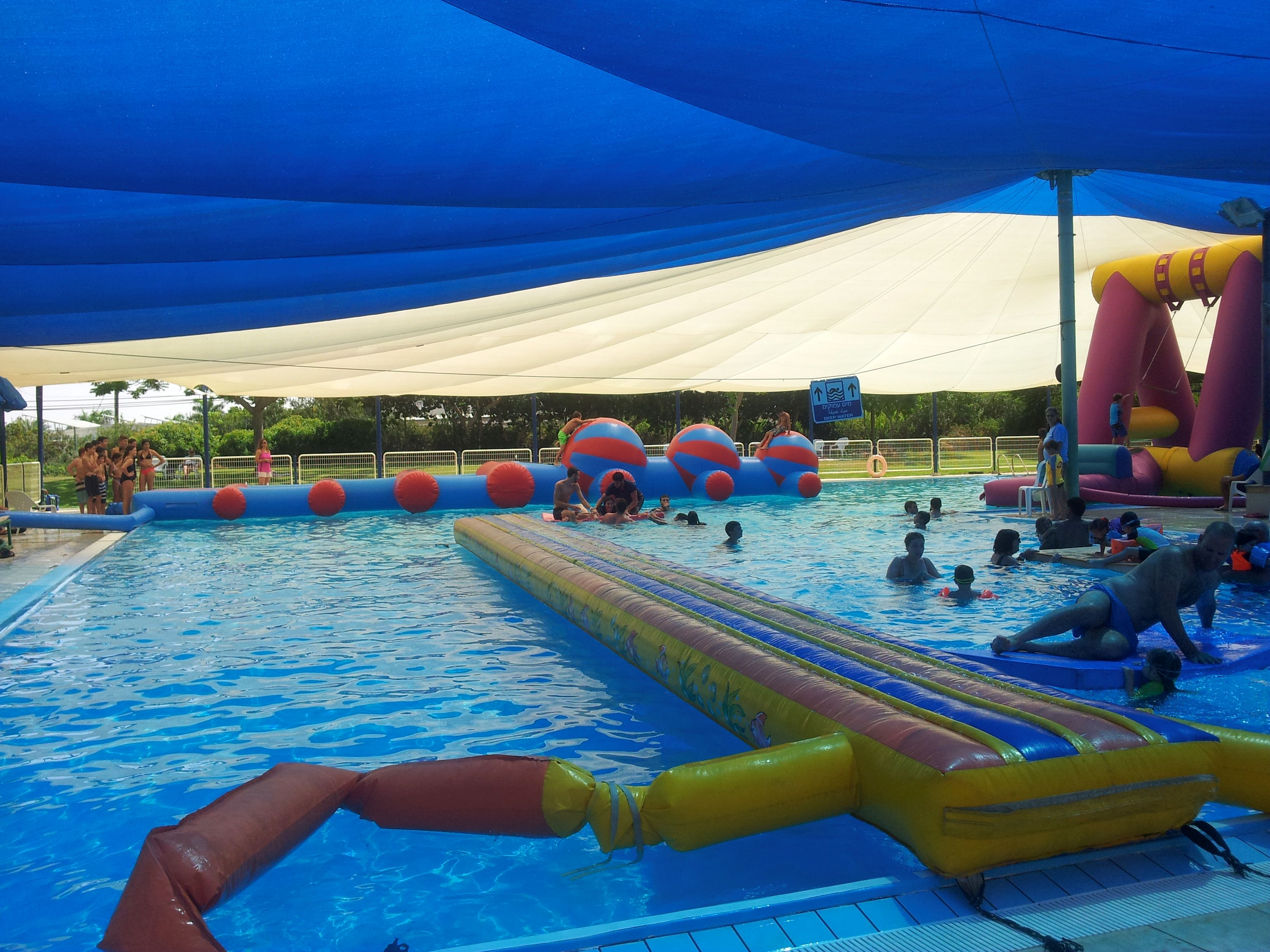 בריכת צופר ביום הילד